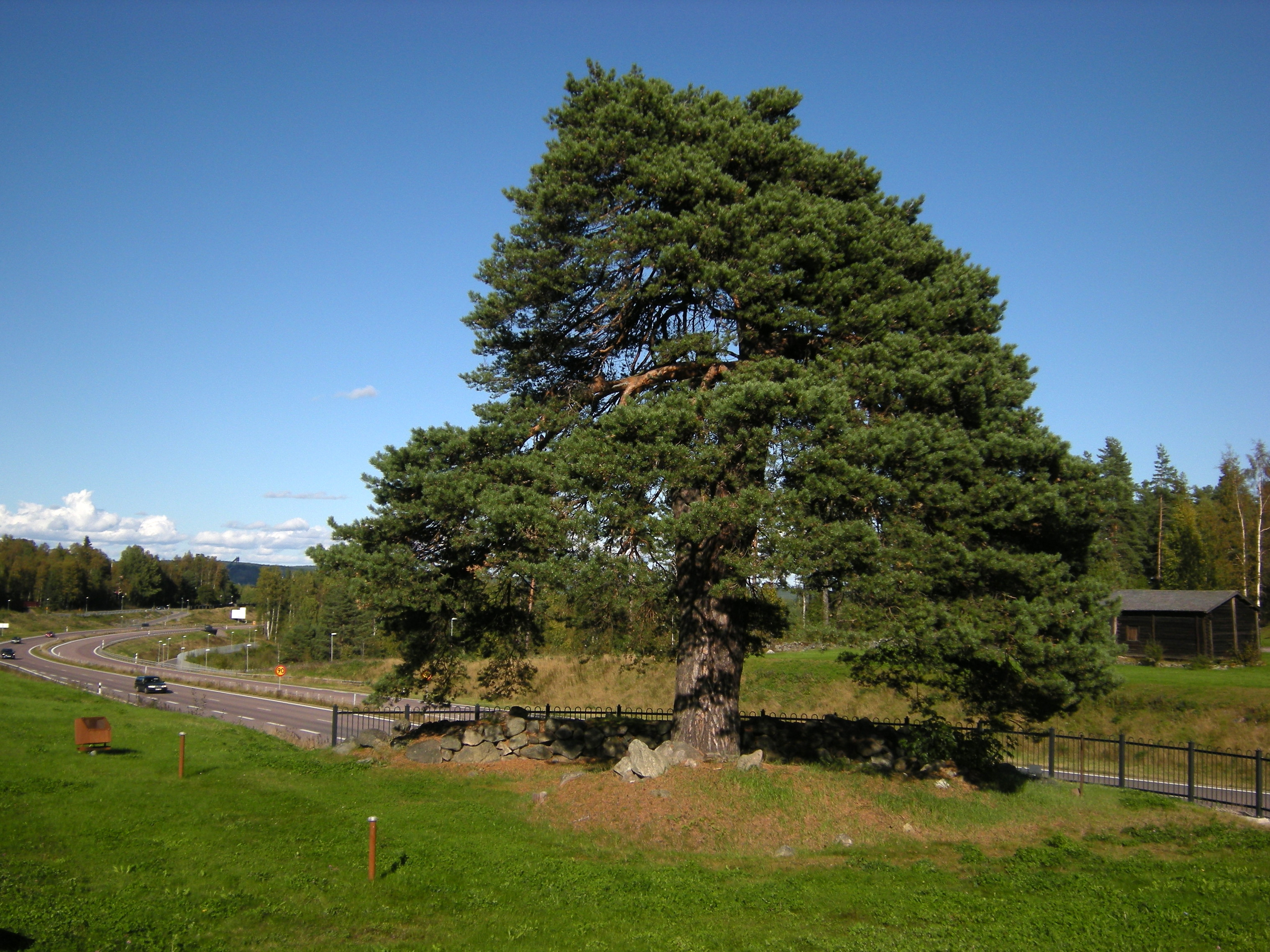 Suptall vid Tallen utanför Falun.